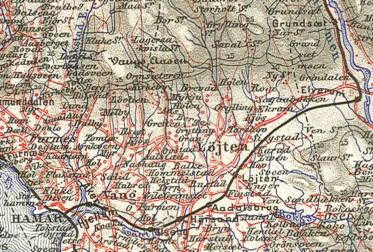 Jernbanen Hamar-Grundset, åpna 1862. Sidespor Ådalsbruk-Klevfoss (åpna 1890) er ikke inntegna på kartet.